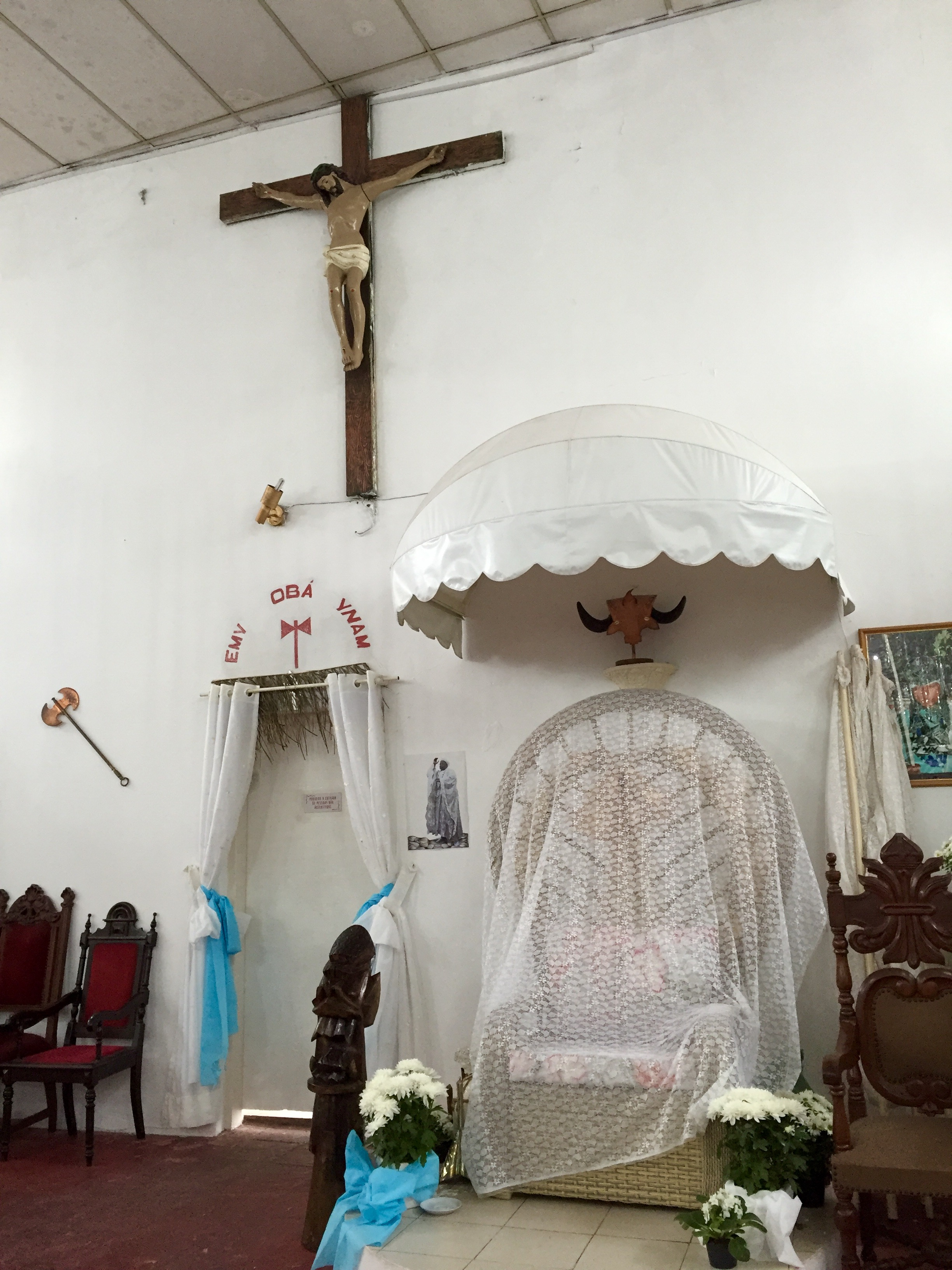 Cadeira da Mãe Paula de Yansã, com a cruz e Jesus Cristo acima, no salão do Axé Ilê Obá, em São Paulo (SP), Brasil.